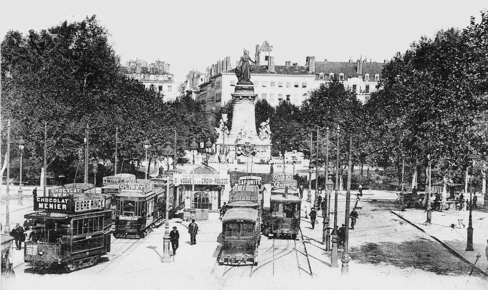 Carte postale ancienne éditée par ER N247 Lyon - Place carnot - Station des Tramways retouches depuis Image:LYON Tramways Place Carnot.JPG : retrait du texte, recadrage, corrections